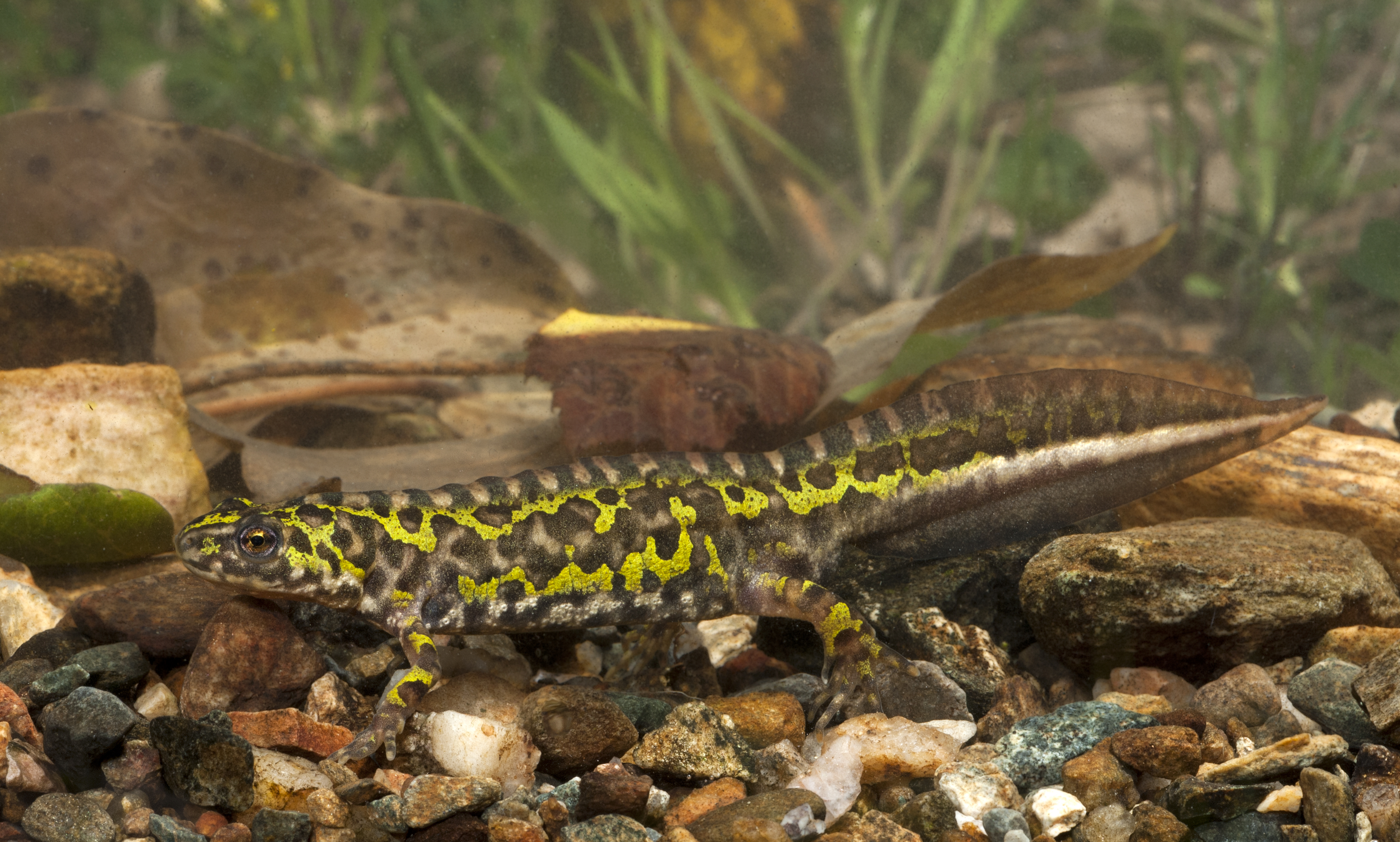 Zwerg-Marmormolch (Triturus pygmaeus) aus Andalusien in Spanien